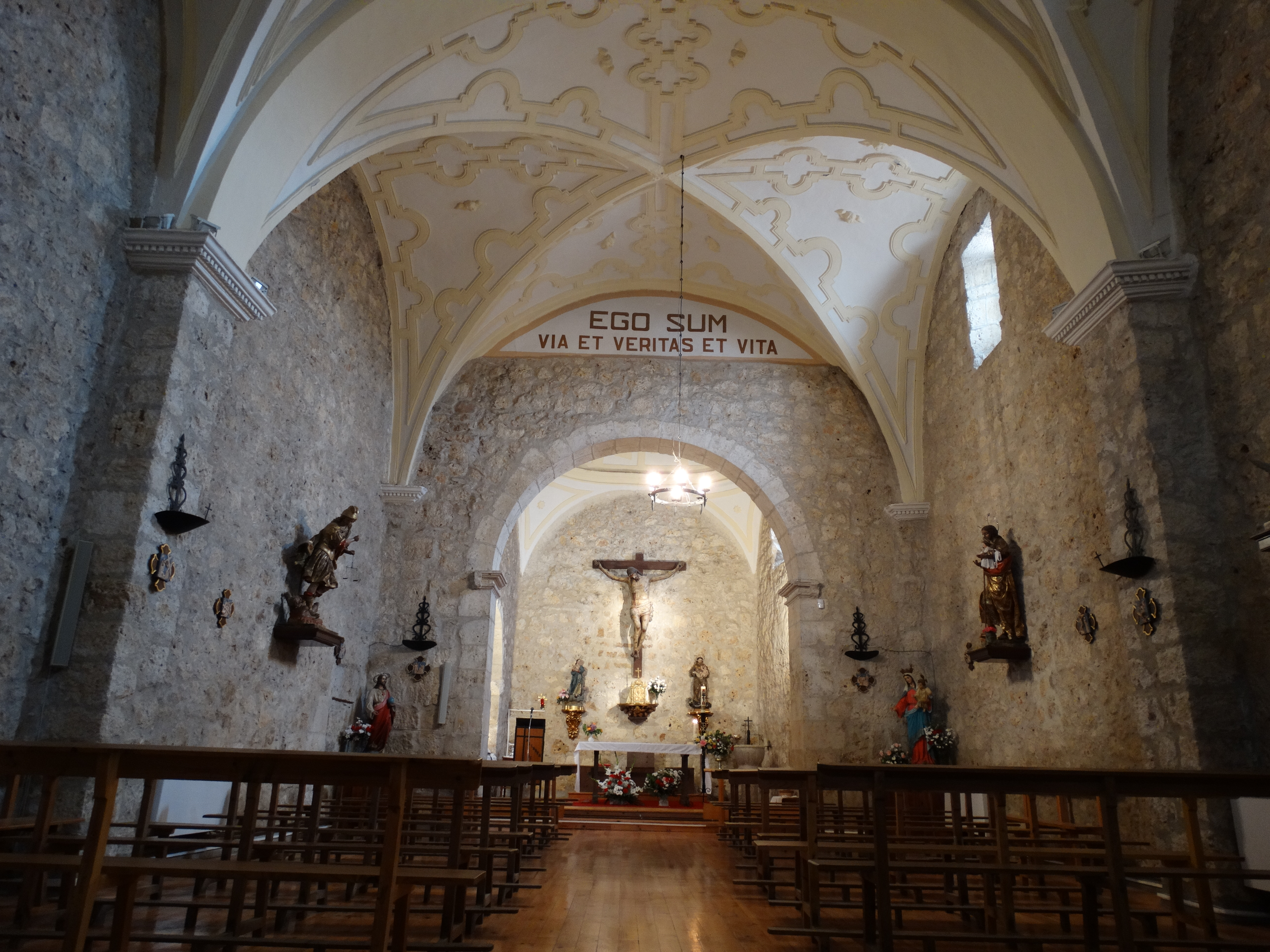 La Mudarra (Valladolid, España). Iglesia parroquial de Nuestra Señora del Rosario del siglo XVIII, barroca. Nave y presbiterio con un crucifijo de cartón piedra del siglo XVII cedido por el Arzobispado de Valladolid. Arcosolio de medio punto a la izquierda con una Virgen de vestir del siglo XVIII con corona. Escultura de San Antonio de Padua de 97 cm, del estilo del escultor Francisco de Sierra. Escultura de la Inmaculada de 94 cm de estilo rococó con manto azul y túnica con flores.